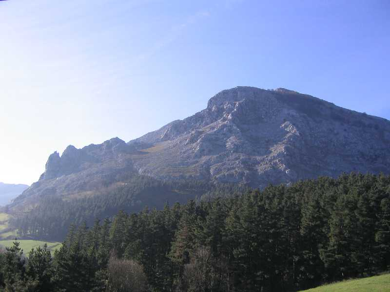 Vista del monte Untxilaitz, Vizcaya, País Vasco, España.